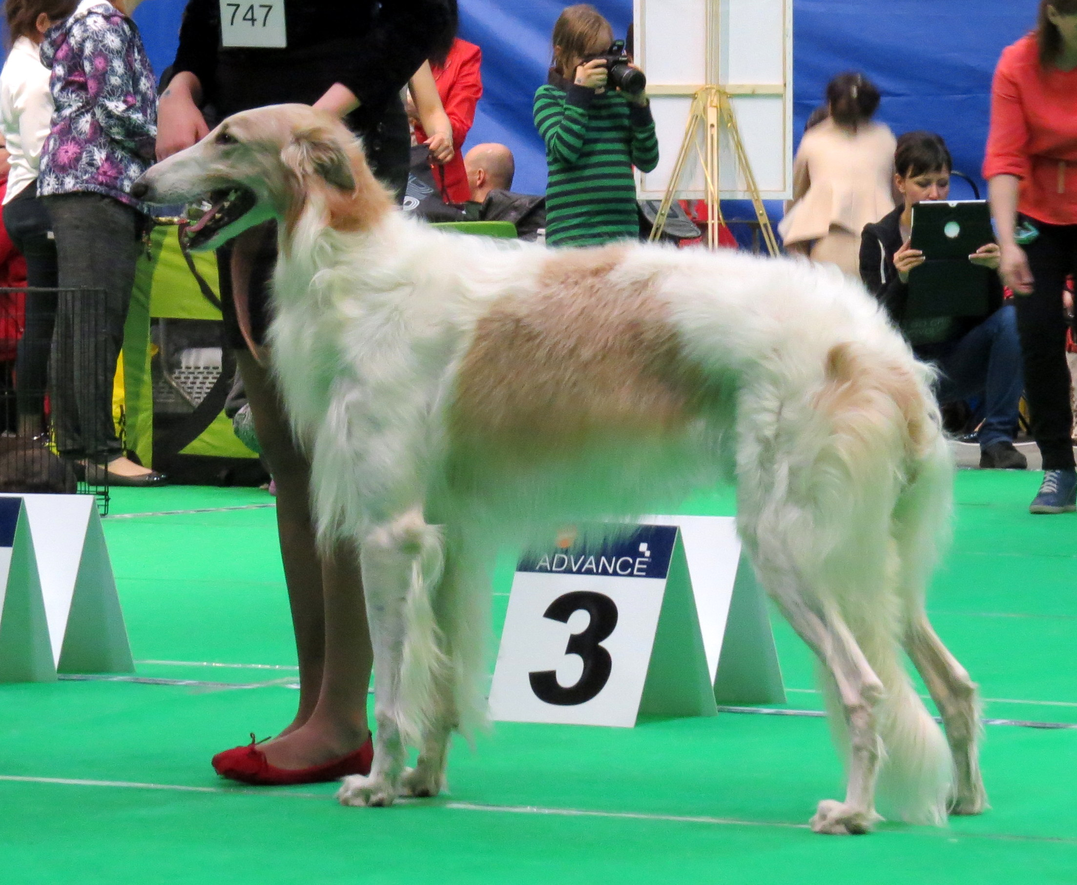 РПБ на выставке